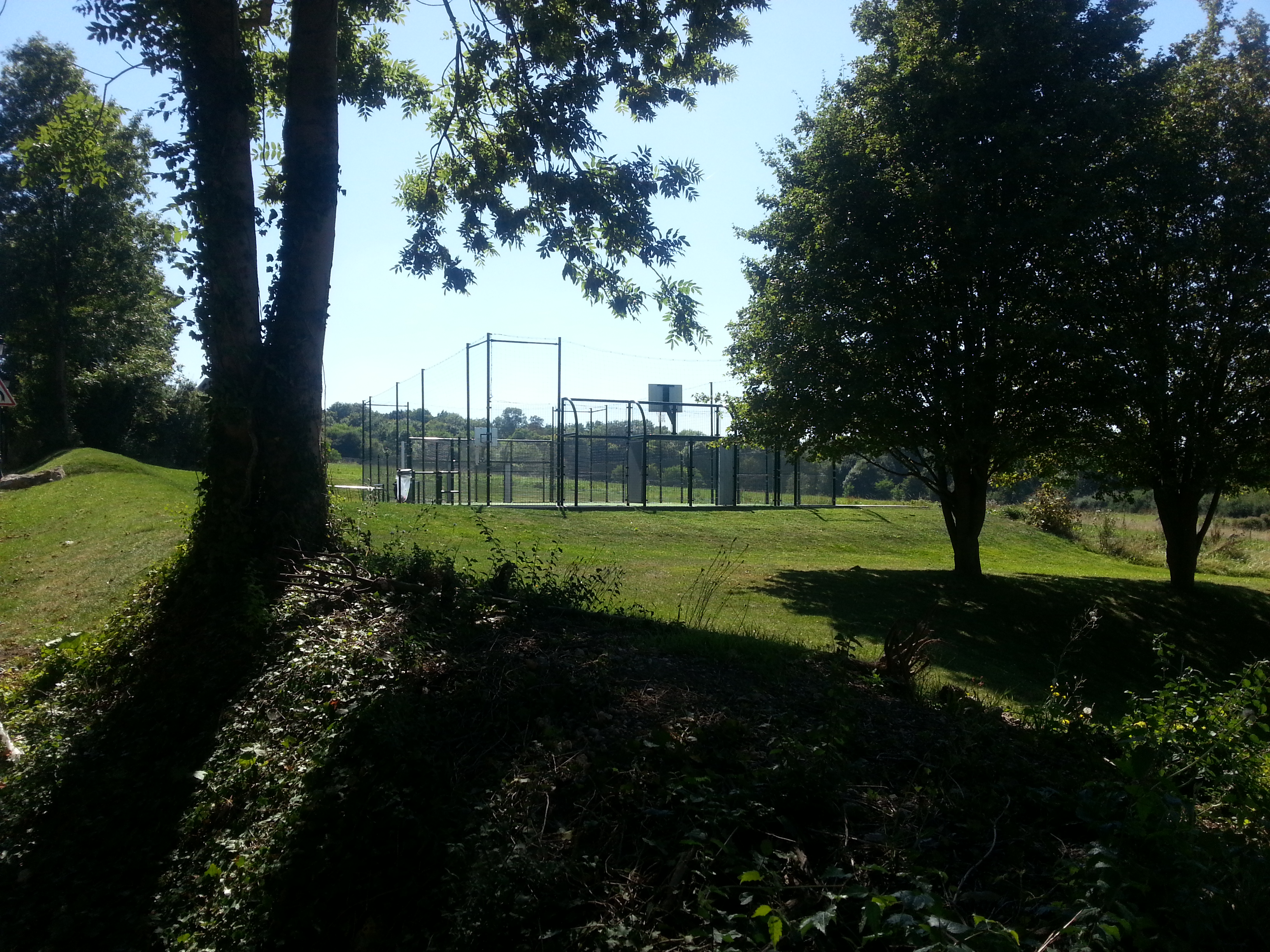 Terrain multisports, Coupvray (Seine-et-Marne).